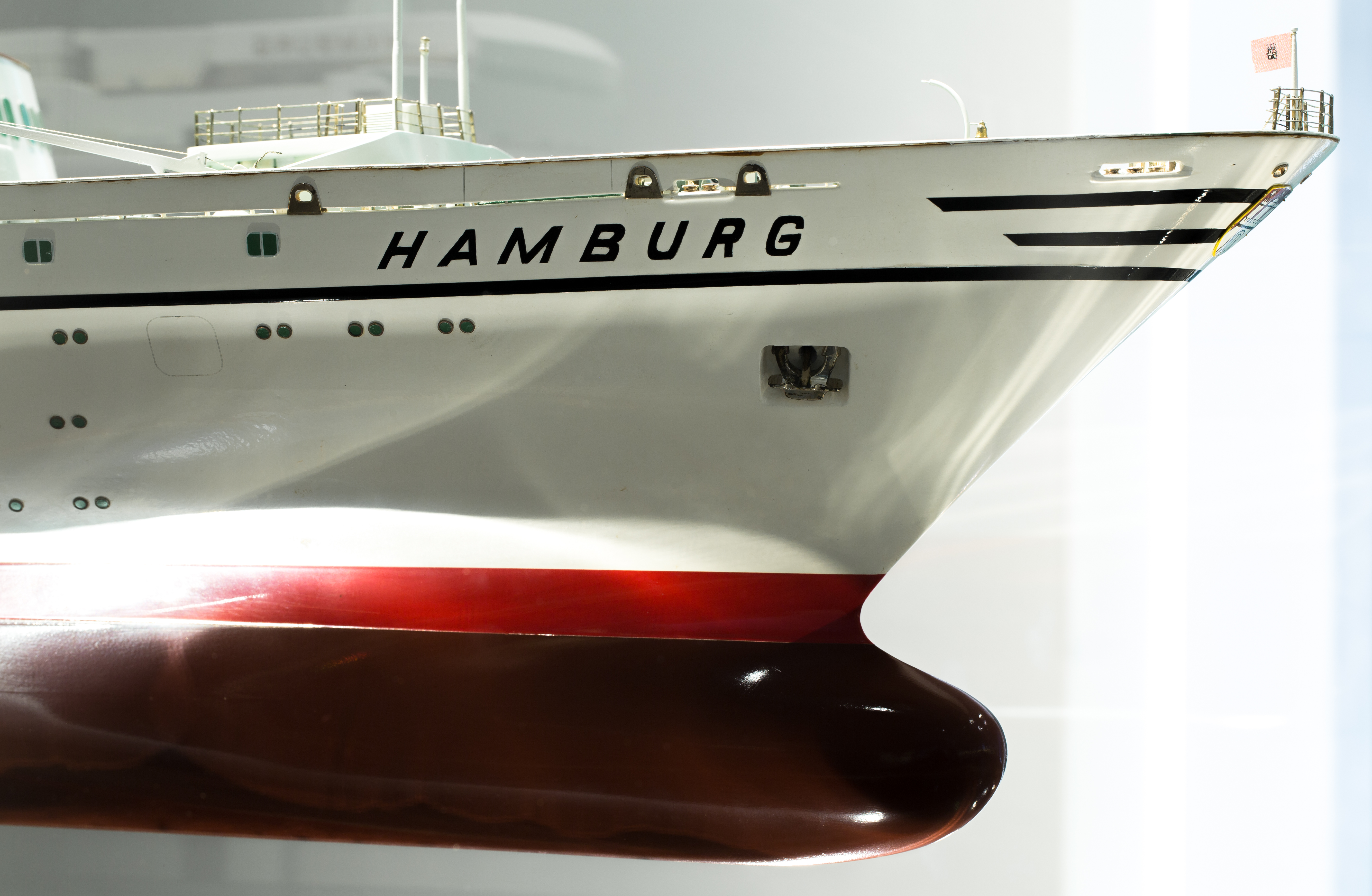 Schiffsmodell der Hamburg im Museum für Hamburgische Geschichte.